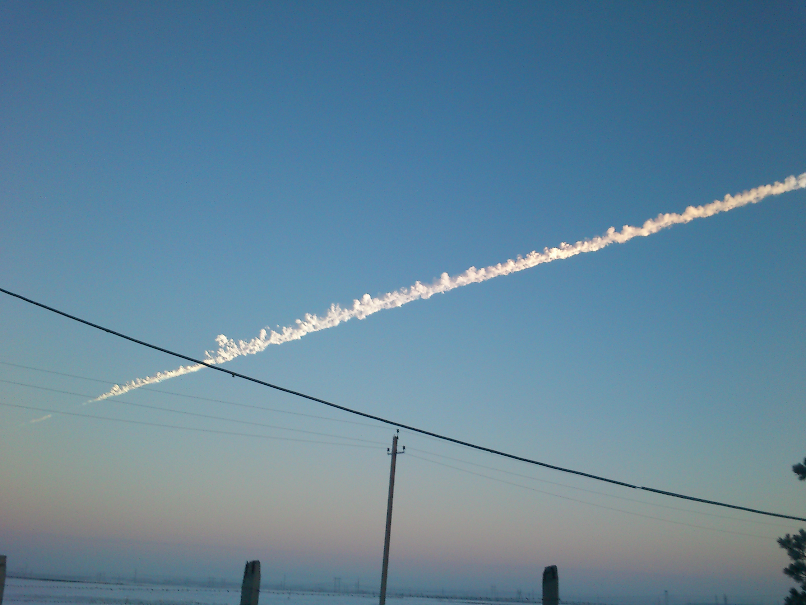 Падение метеорита в Троицке